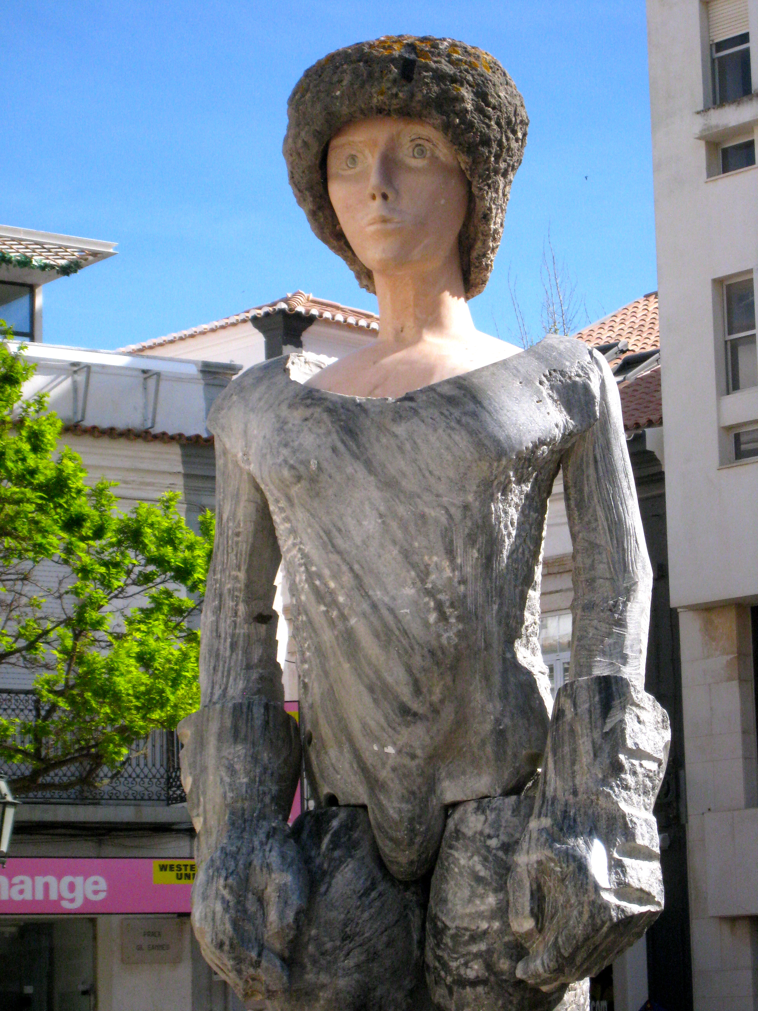 Lagos - 168